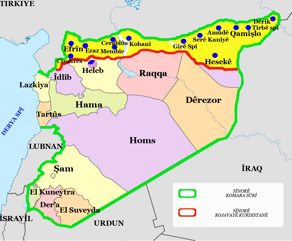 Карта Сирии и сирийского Курдистана. Граница курдского автономного образования определена на основании политических требований курдов Сирии. В сирийский Курдистан включены территории, фактически находящиеся под контролем курдских сил самообороны, и места, где курды составляют абсолютное или относительное большинство.